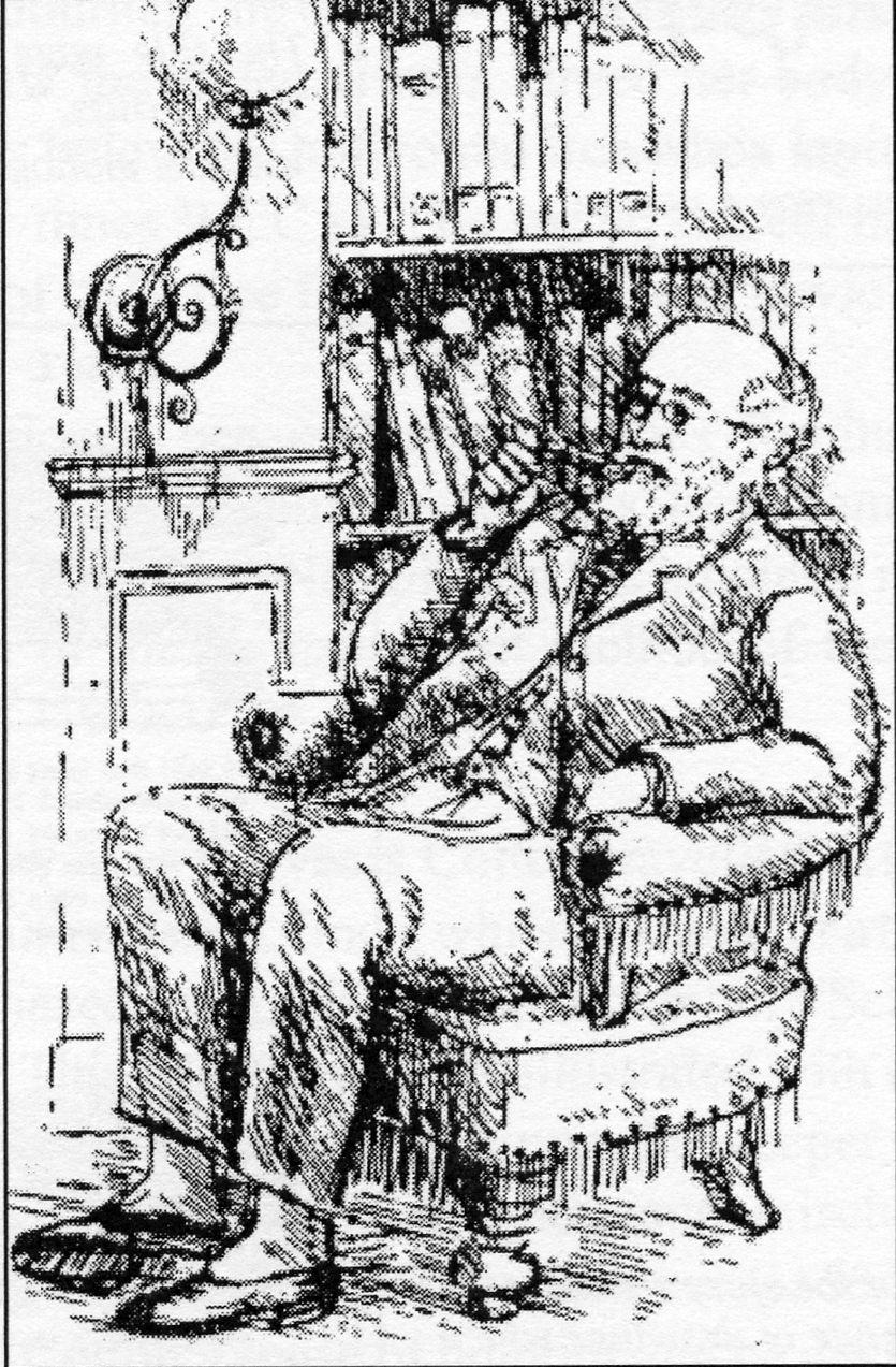 Drawing